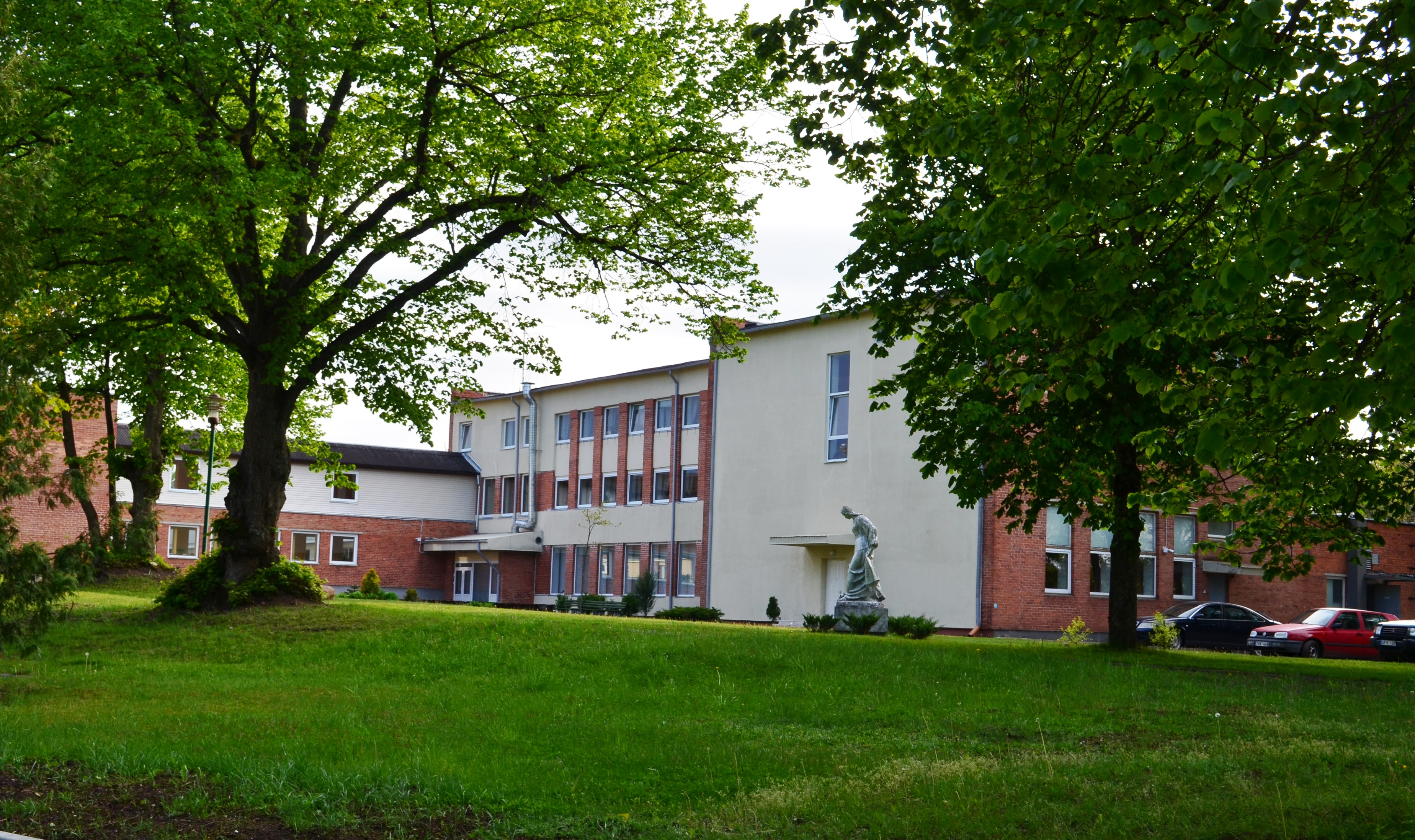 Antavilių senelių namai, Vilnius